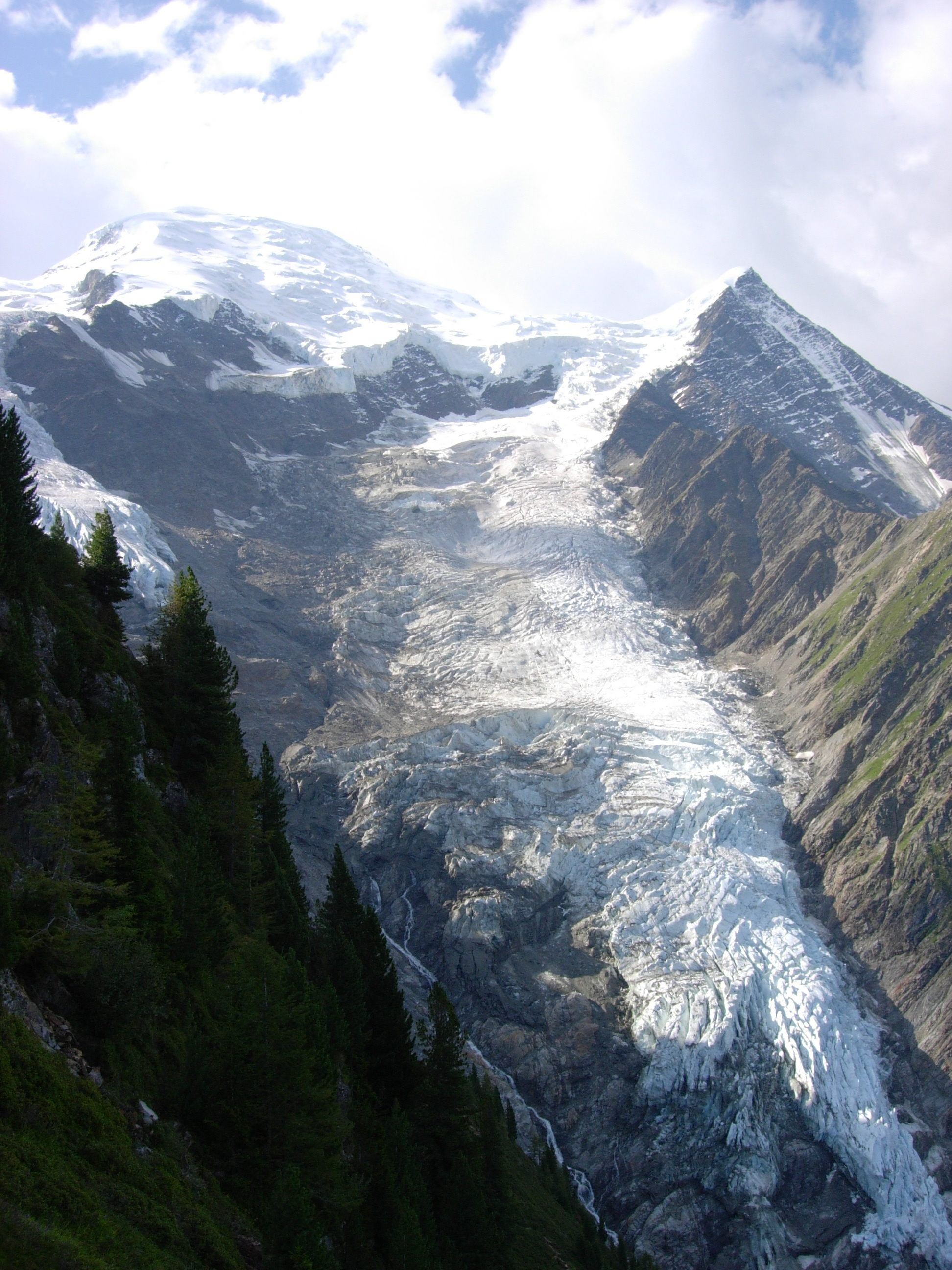 Le glacier de Taconnaz depuis le sentier de la jonction